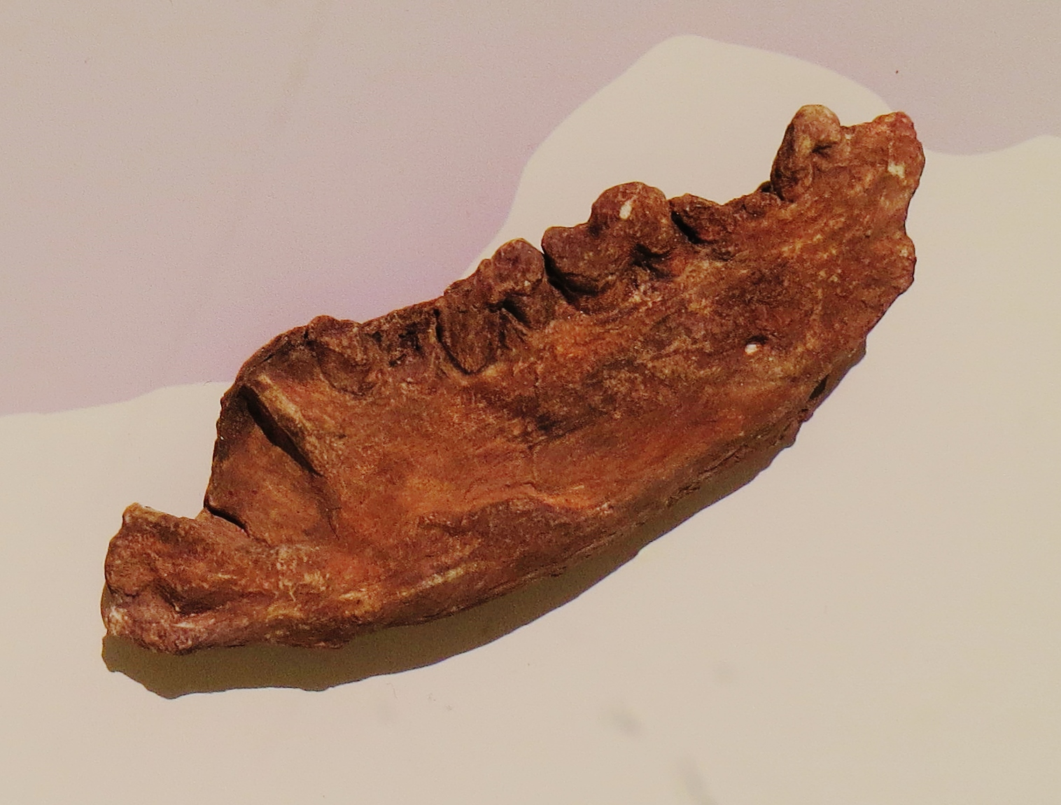 Fossil - Took the picture at Museum of Natural History, Karlsruhe